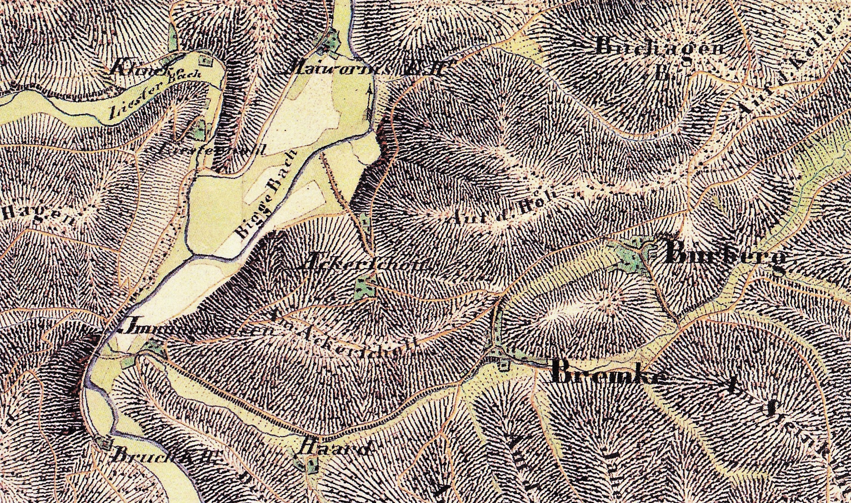 Kartenausschnitt aus dem Jahre 1836. Bürberg und Bremge (Bremke) mit Haardt. Westlich davon das Biggetal mit den untergegangenen Orten (v.o.l.): Klinke, Maiwormshammer, Listernohl, Ackerschott, Imminghausen und Bruchwalze (alle heute Biggesee).